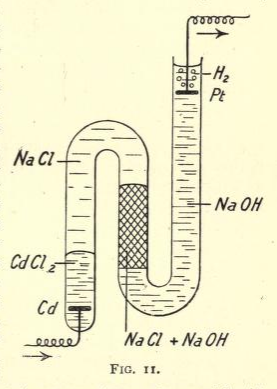 Apparecchio di Hittorf per lo studio della migrazione degli ioni